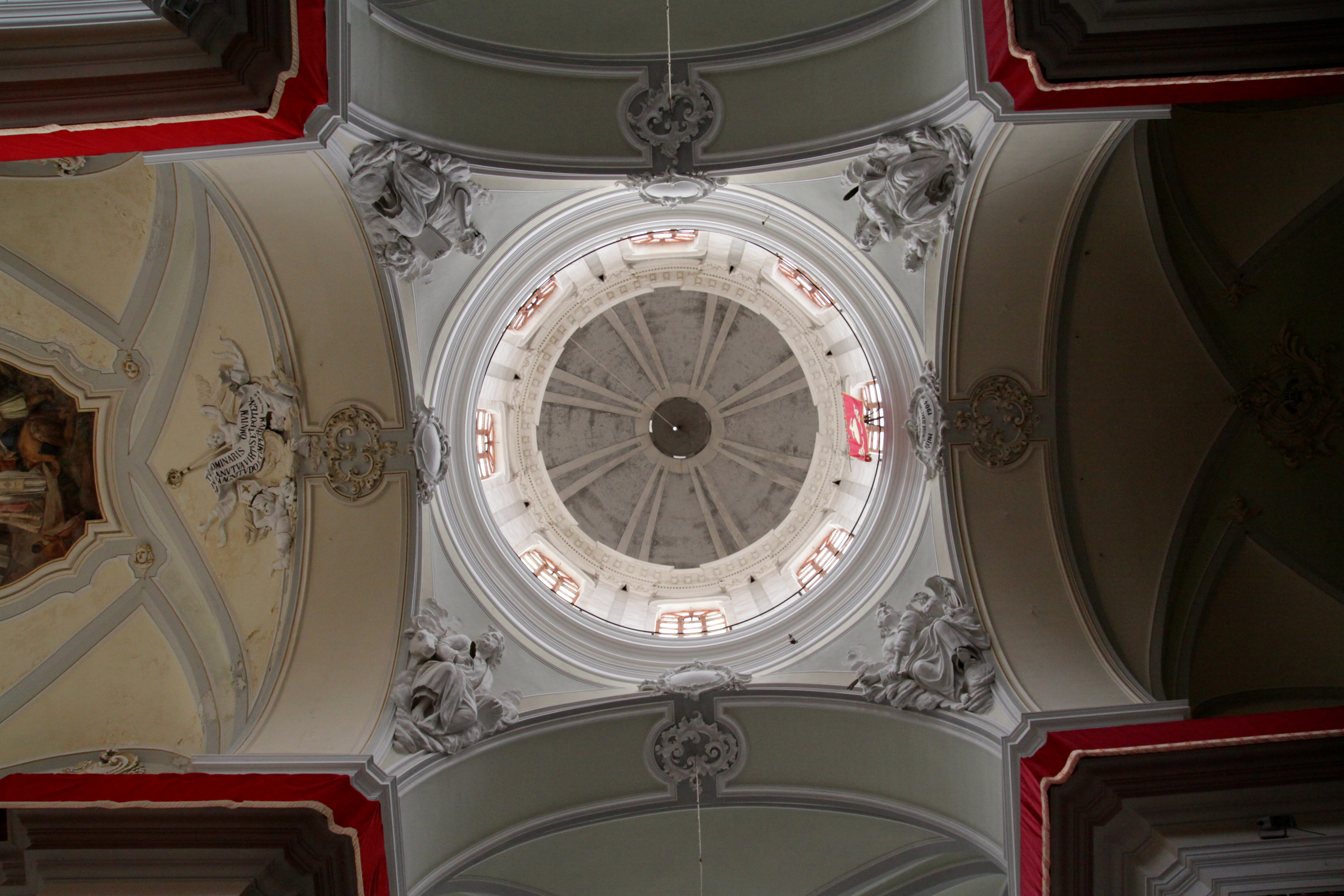 Interno della Chiesa Madre S. Nicolò - SS. Salvatore. Paerticolare della crociera con la cupola.